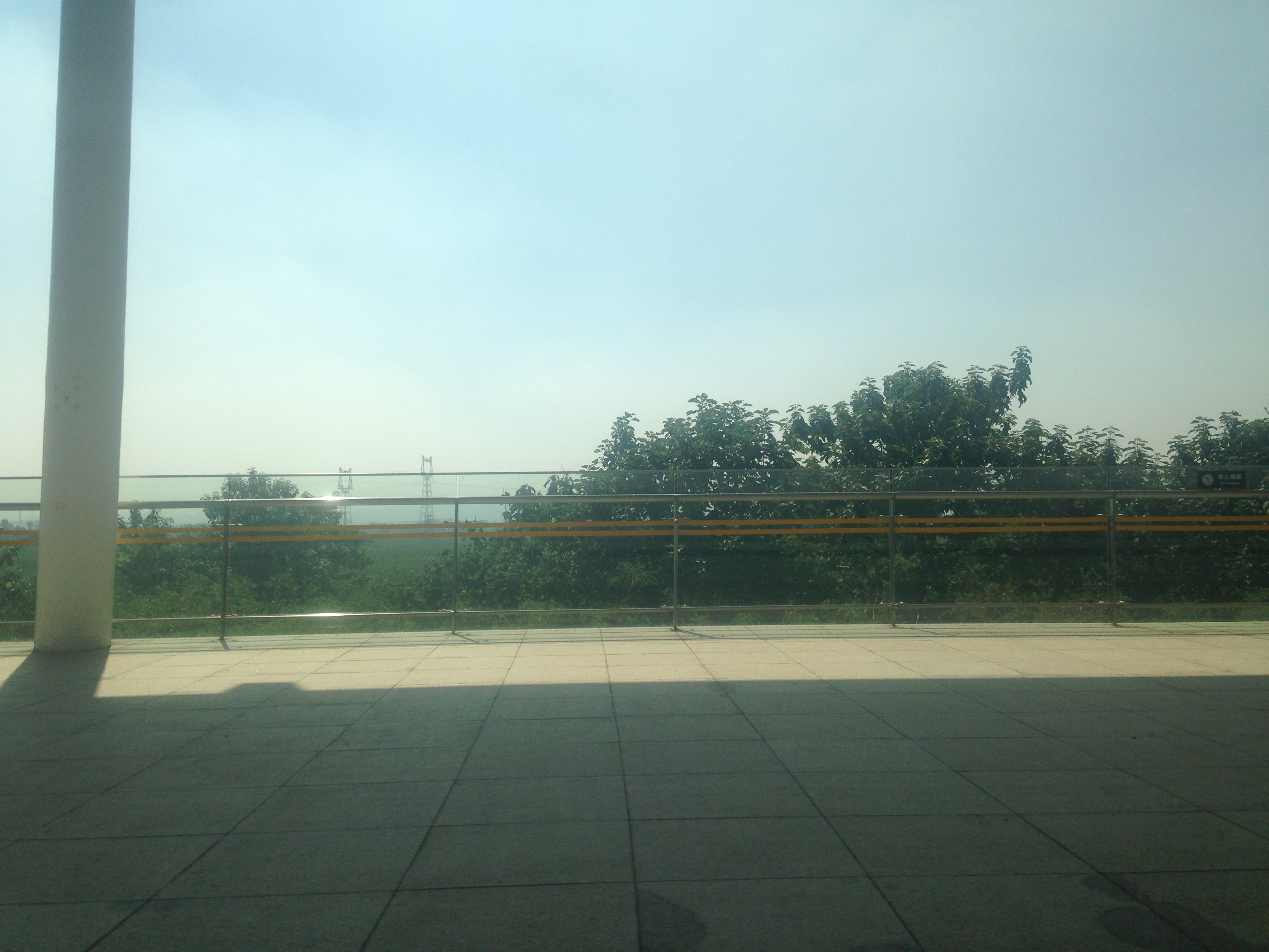 石武旅客専用線の列車内より望む高邑西駅のホーム